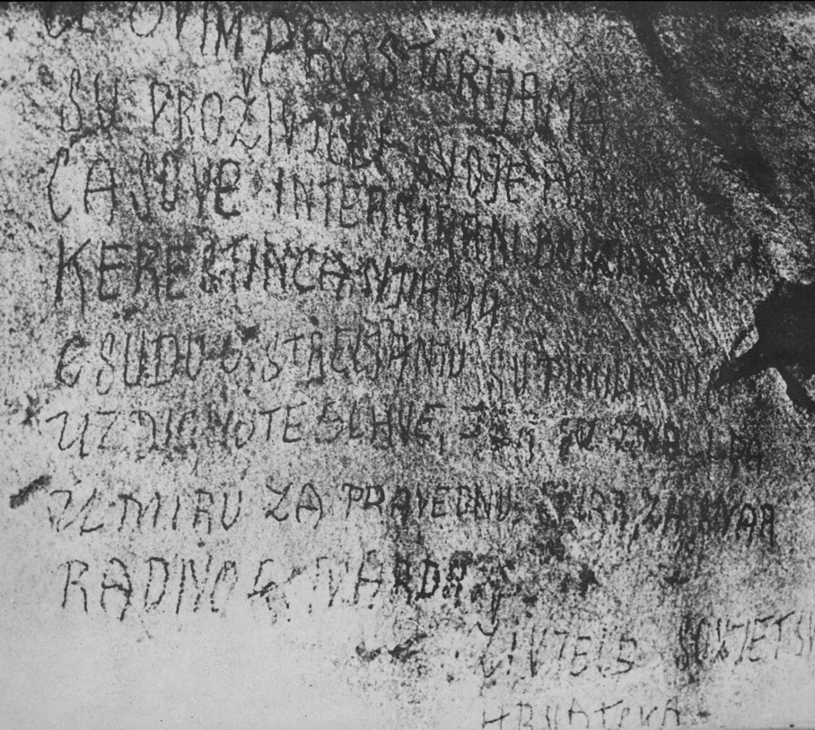 Srpskohrvatski / српскохрватски: Poslije Drugog svjetskog rata, tokom preuređenja prostorija u bivšem ustaškom zatvoru u ulici Račkoga 9, pronađen je zapis: "U ovim su prostorijama proživjeli svoje posljednje časove internirani borci iz Kerestinca četrdeset četvorica. Osudu o strijeljanju primili su svi uzdignute glave, jer su znali da umiru za pravednu stvar, za stvar radnog naroda. Živjela sovjetska Hrvatska!" Ekspertizom rukopisa utvrđeno je da je autor zapisa August Cesarec. Fotografija zapisa objavljena je u listu Borba 4. siječnja 1961. godine.[1]